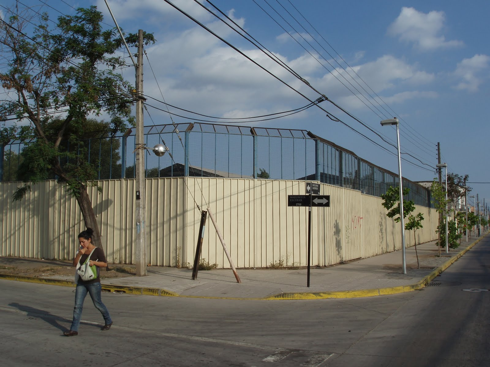 Hogar Galvarino del SENAME, visto de la calle Maquinista Escobar